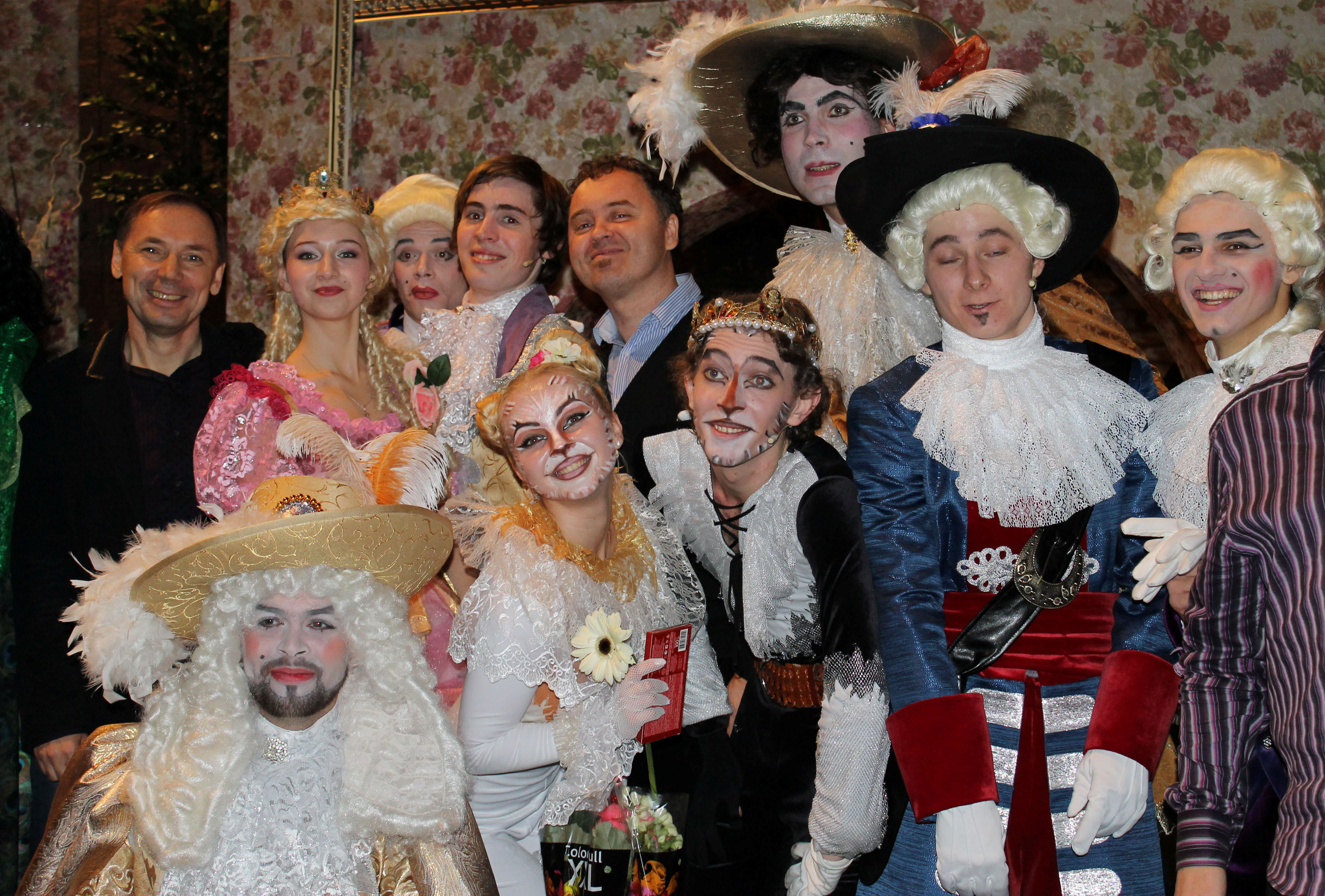 Премьера мюзикла "Кот в сапогах" в Нижегородском ТЮЗе 1 ноября 2013 года